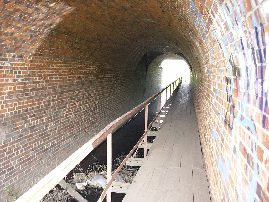 Przepust rzeczki Brochówki pod torami kolejowymi wraz z kładką dla pieszych wzdłuż nurtu.